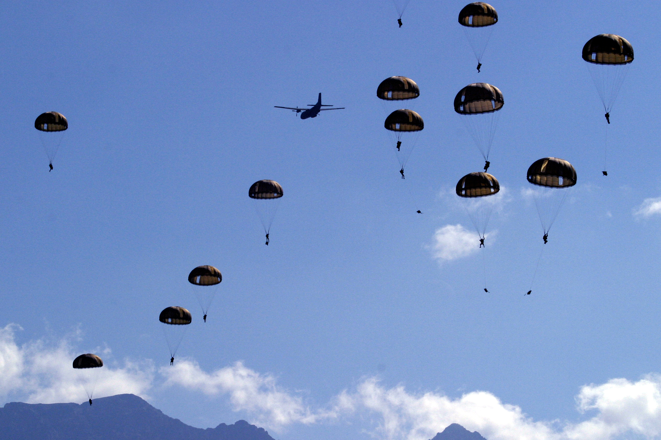 Largage de légionnaires parachutistes en Balagne (Corse)